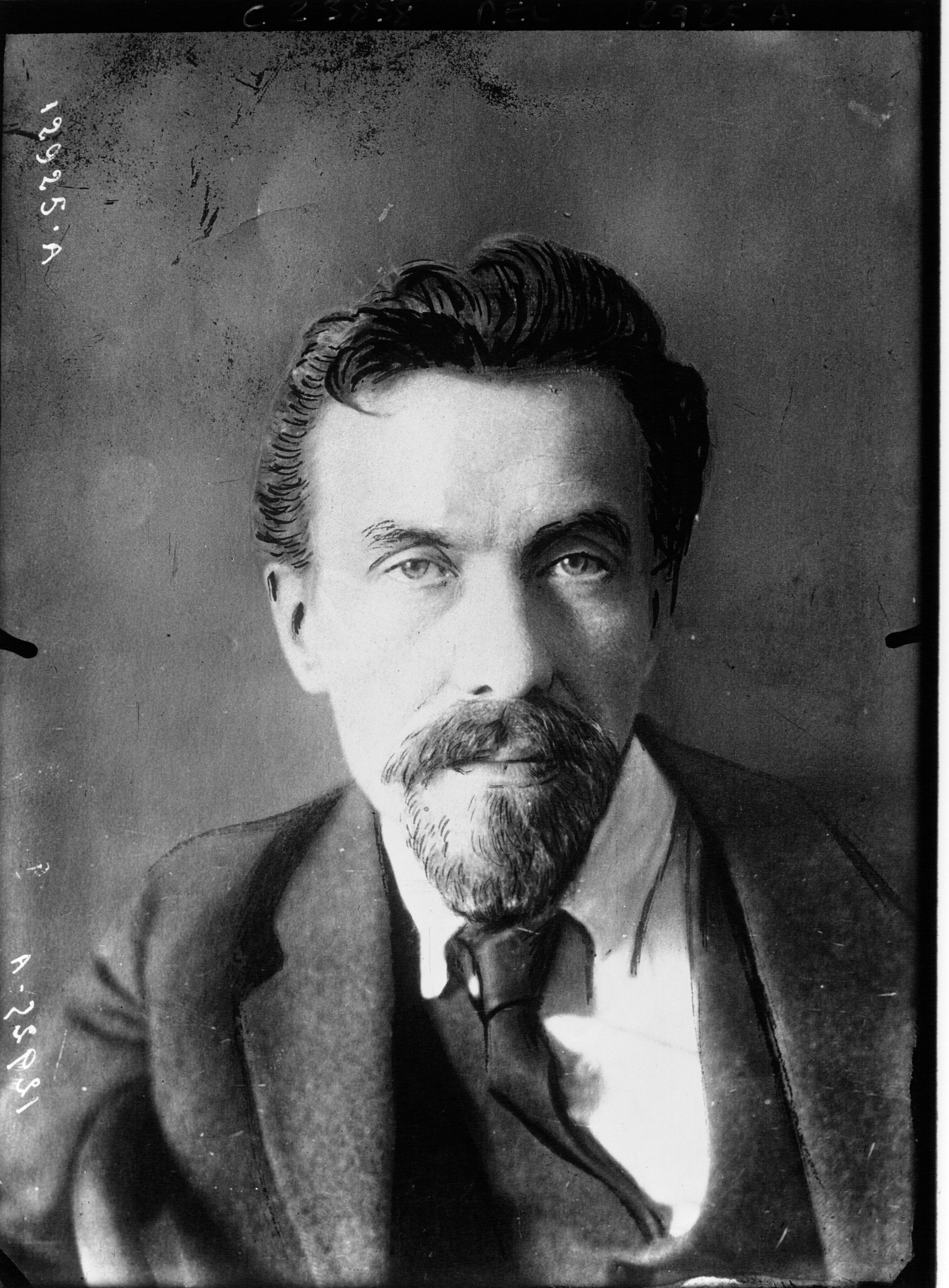 Alexéi Rýkov en 1924.